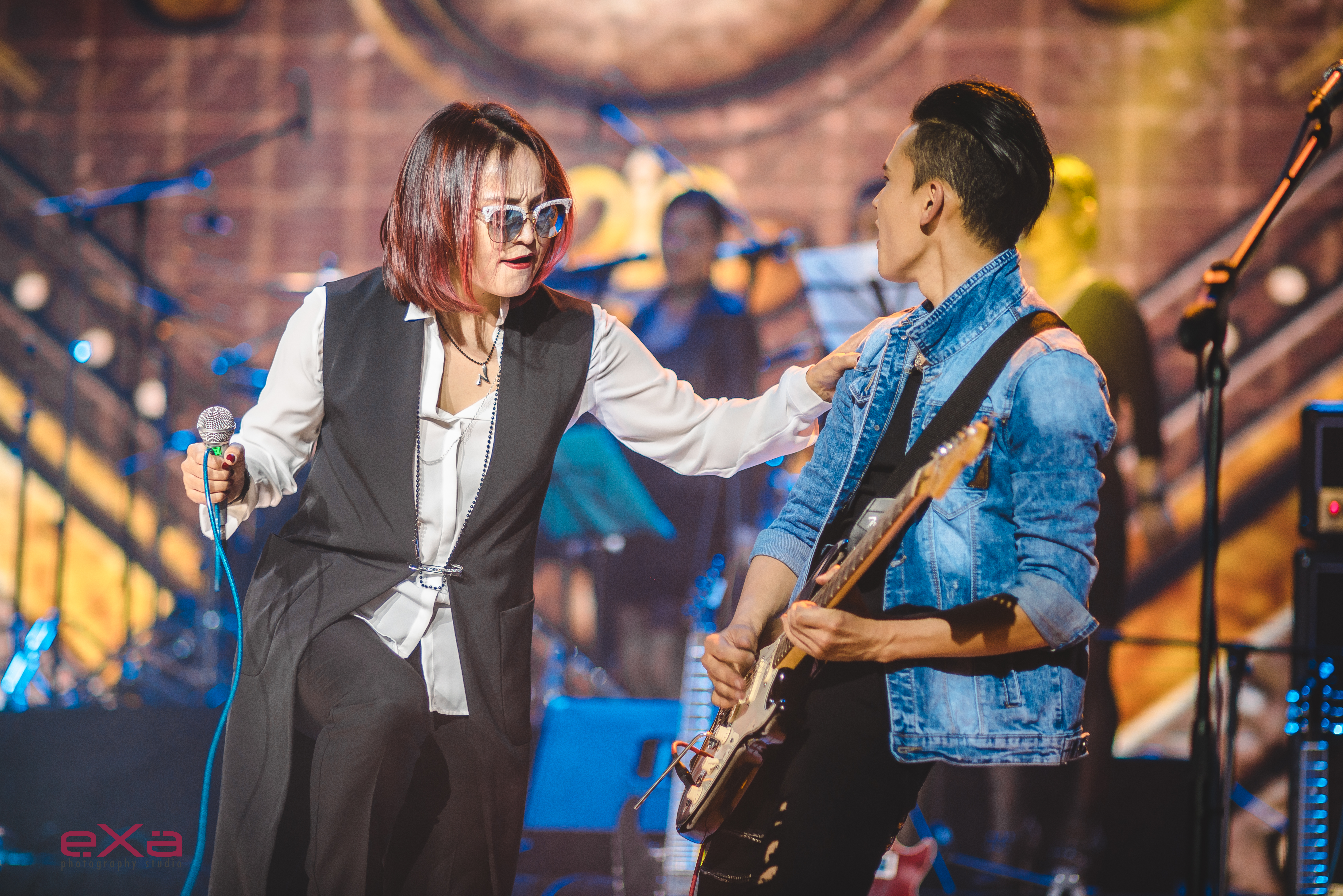 Монгол: Дуучин наран Андууд хамтлагийн гоцлол гитарчины хамт